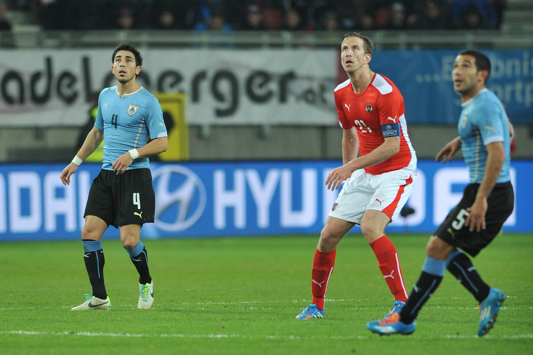 Freundschaftliches Länderspiel Österreich - Uruguay am 5. März 2014 in Klagenfurt: Jorge Fucile, Marc Janko